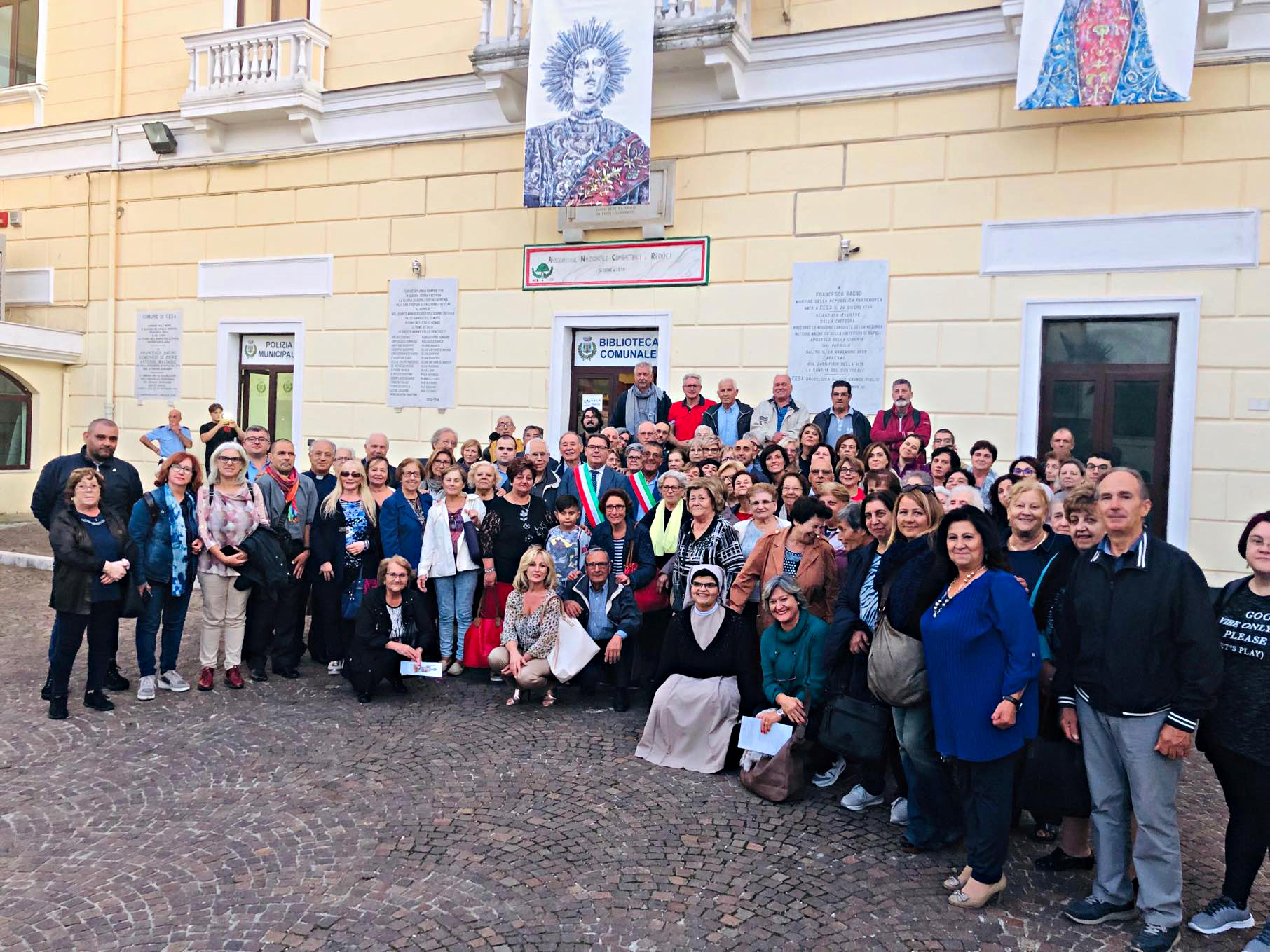 Gemellaggio tra i Comuni di Cesa e di San Cesario di Lecce in onore di San Cesario diacono e martire, 5 ottobre 2019, Piazza A. De Gasperi, Cesa (Ce)